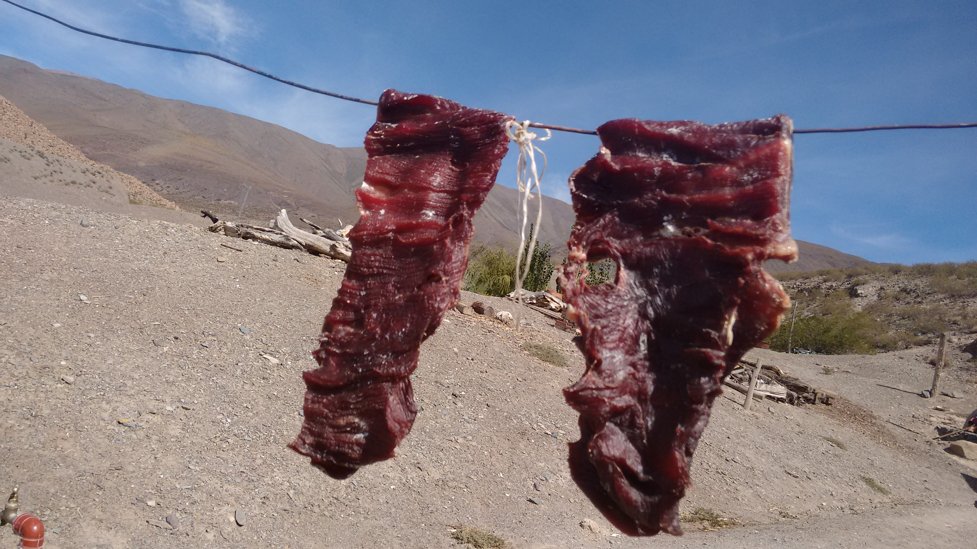 monumento cultural